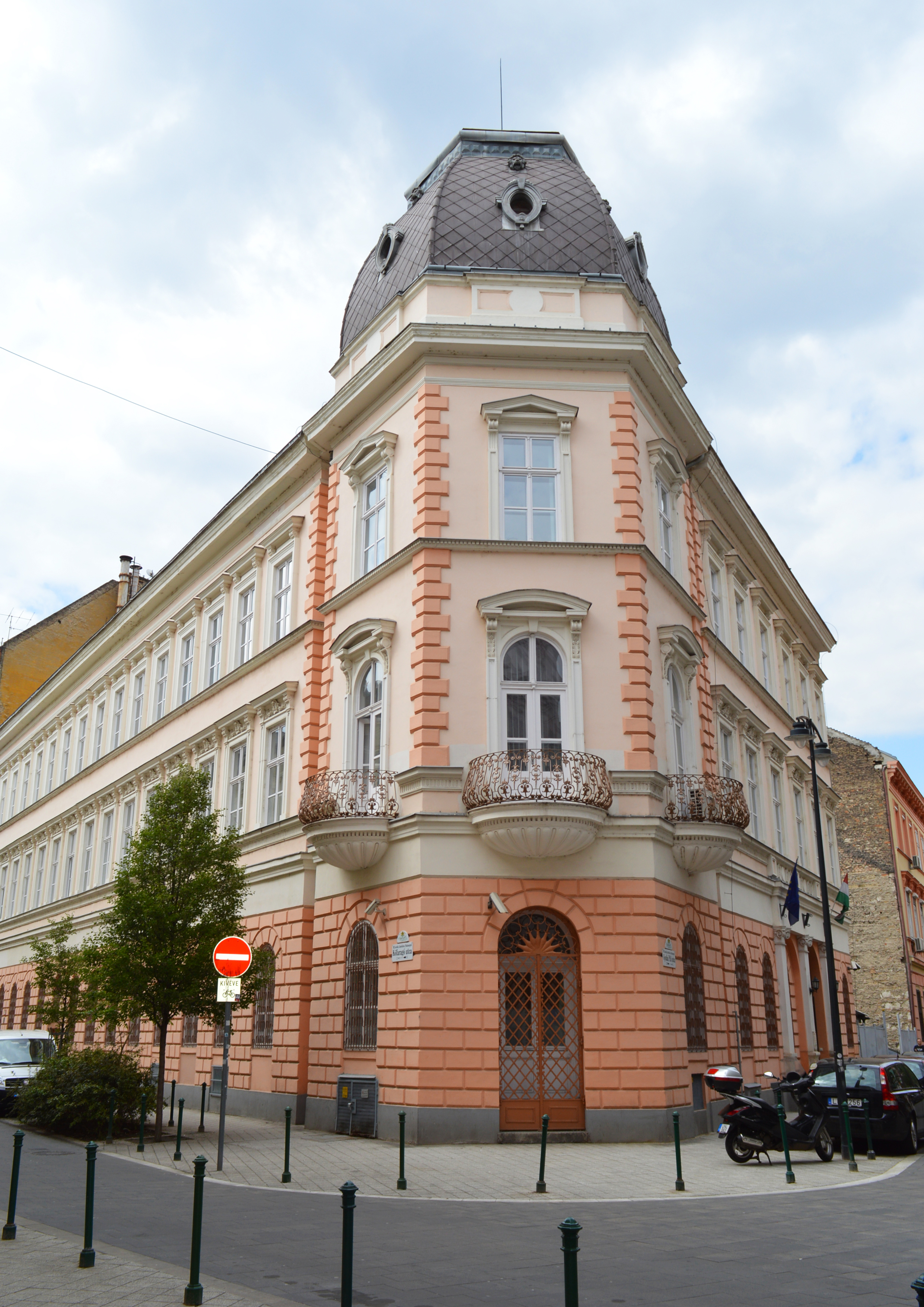 EMET székhely